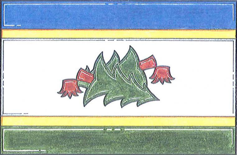 Přísečná vlajka